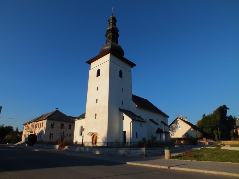 Kostol